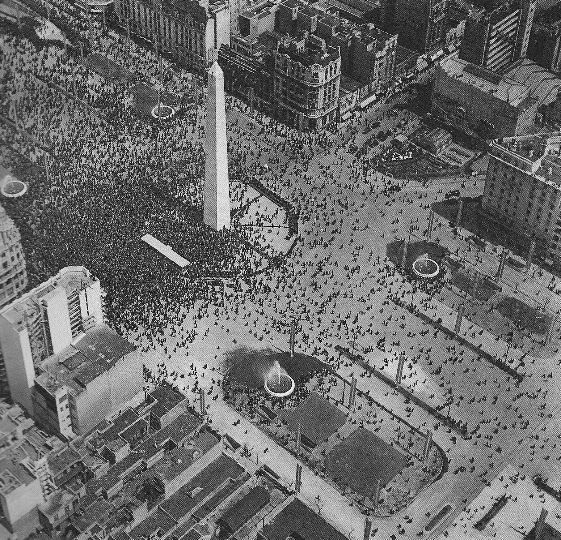 Inauguracion primer tramo Av 9 de Julio en 1937